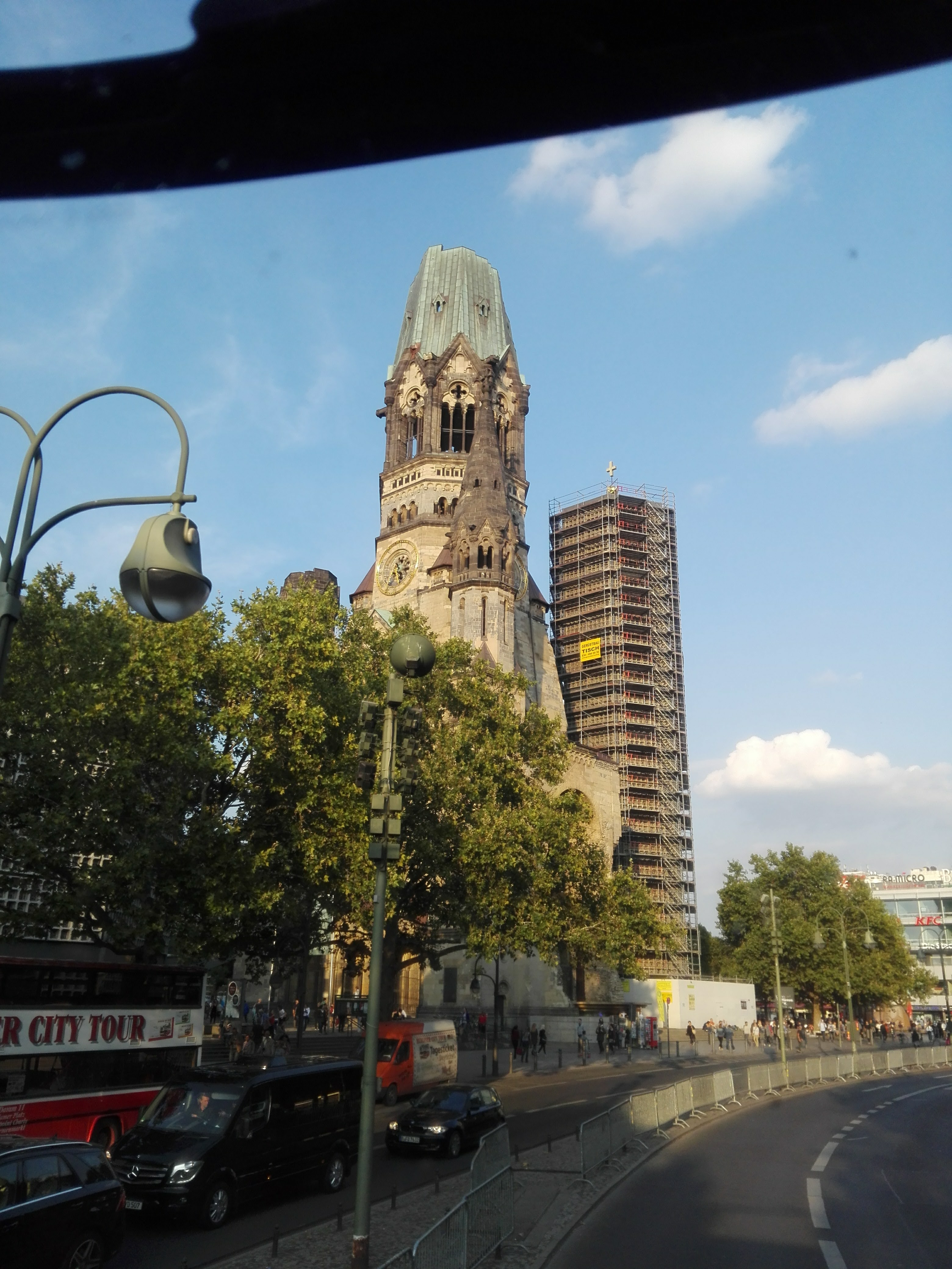 Die evangelische Kaiser-Wilhelm-Gedächtniskirche steht im Berliner Ortsteil Charlottenburg auf dem Breitscheidplatz.